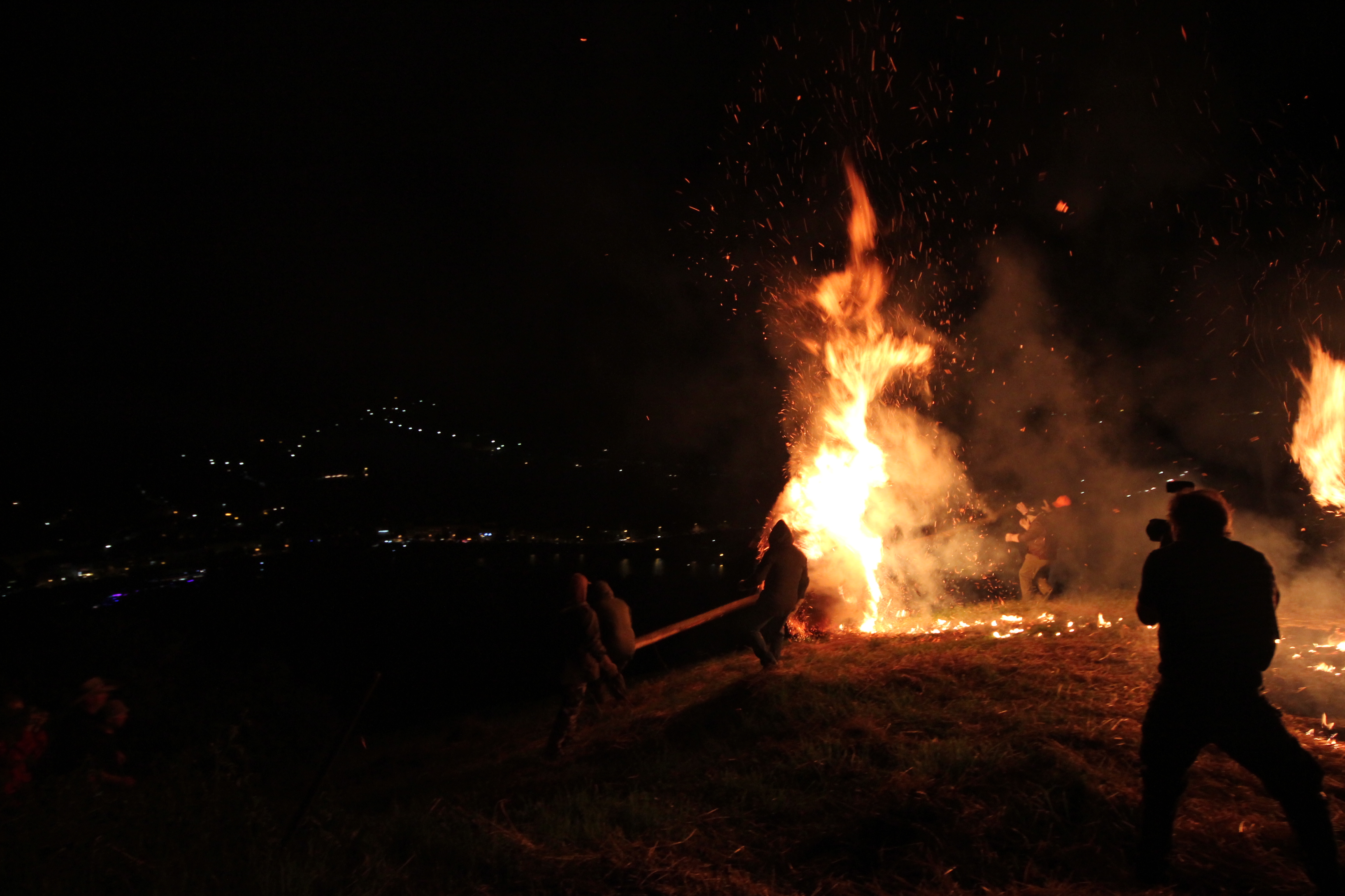 Contz-les-Bains - La roue enflammée et prête à dévaler la colline